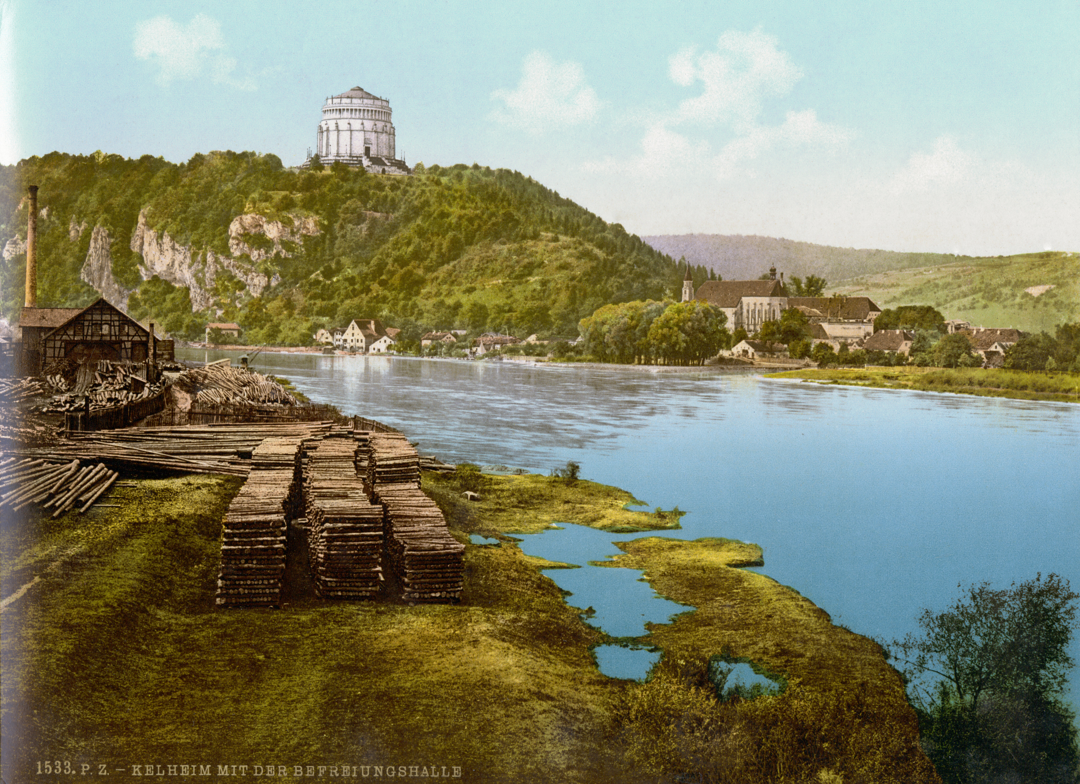 Kelheim: Michelsberg mit Befreiungshalle um 1900